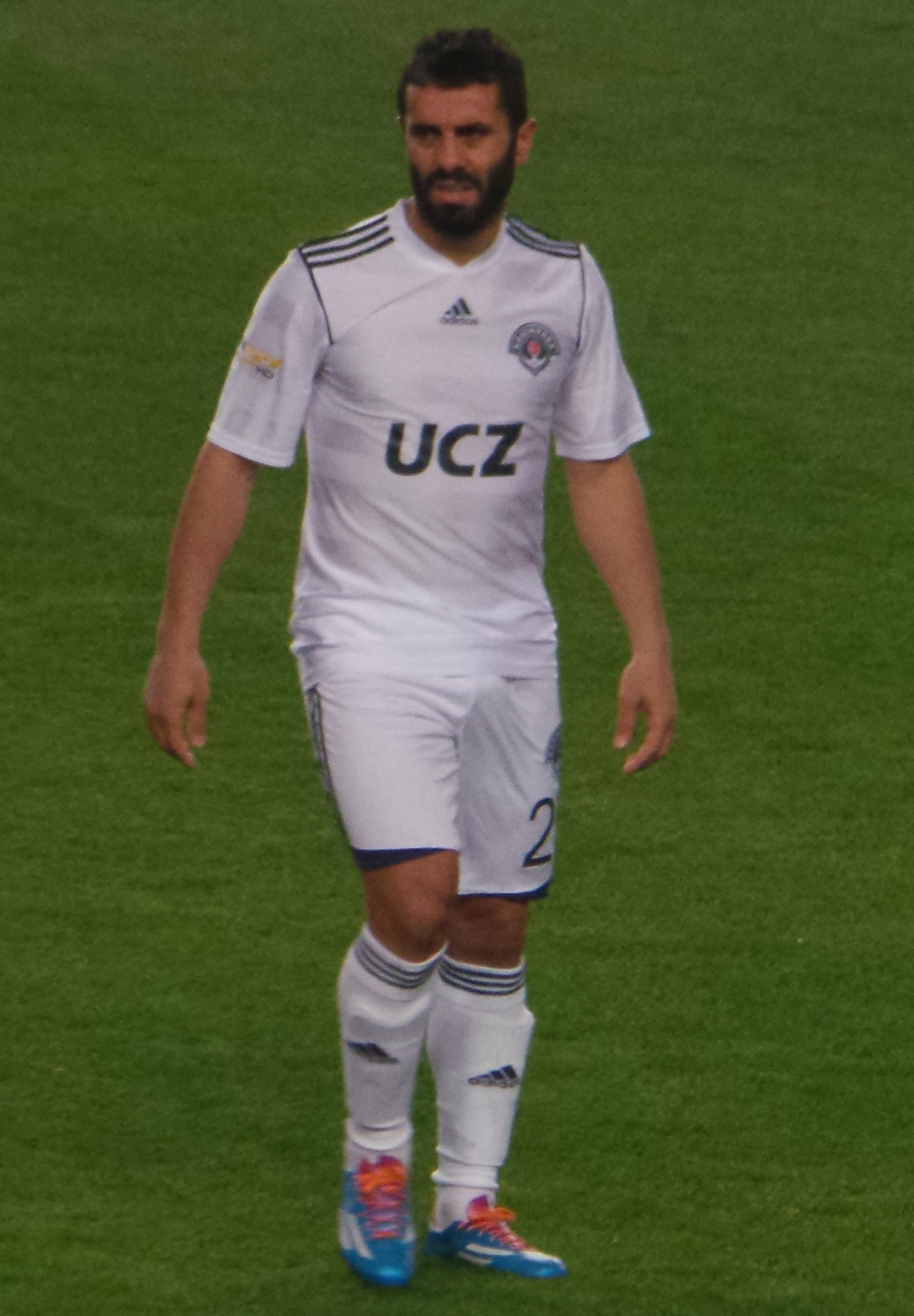 Kerem Şeras